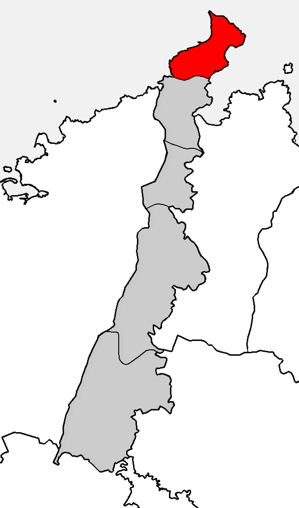 Situación da parroquia de Bares no concello de Mañón